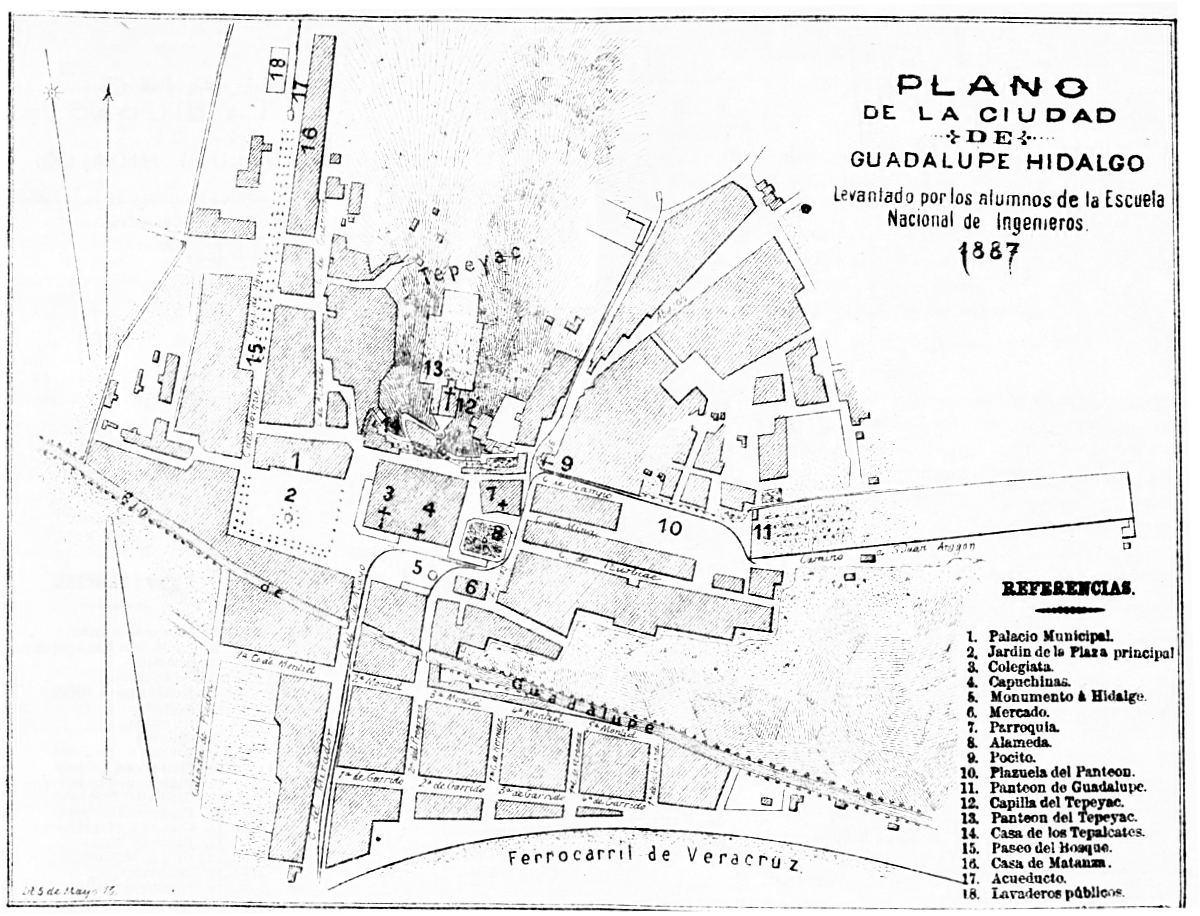 Plano de la ciudad de Guadalupe Hidalgo en 1887, proveniente del libro, La Villa de Guadalupe, su historia, su estadística y sus antigüedades, de Juan de la Torre, 1887, México: Sociedad Mexicana de Geografía y Estadística.pagina 40.